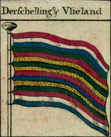 Vlag van Terschellling en Vlieland, volgens Bowles's naval flags of the world, 1783